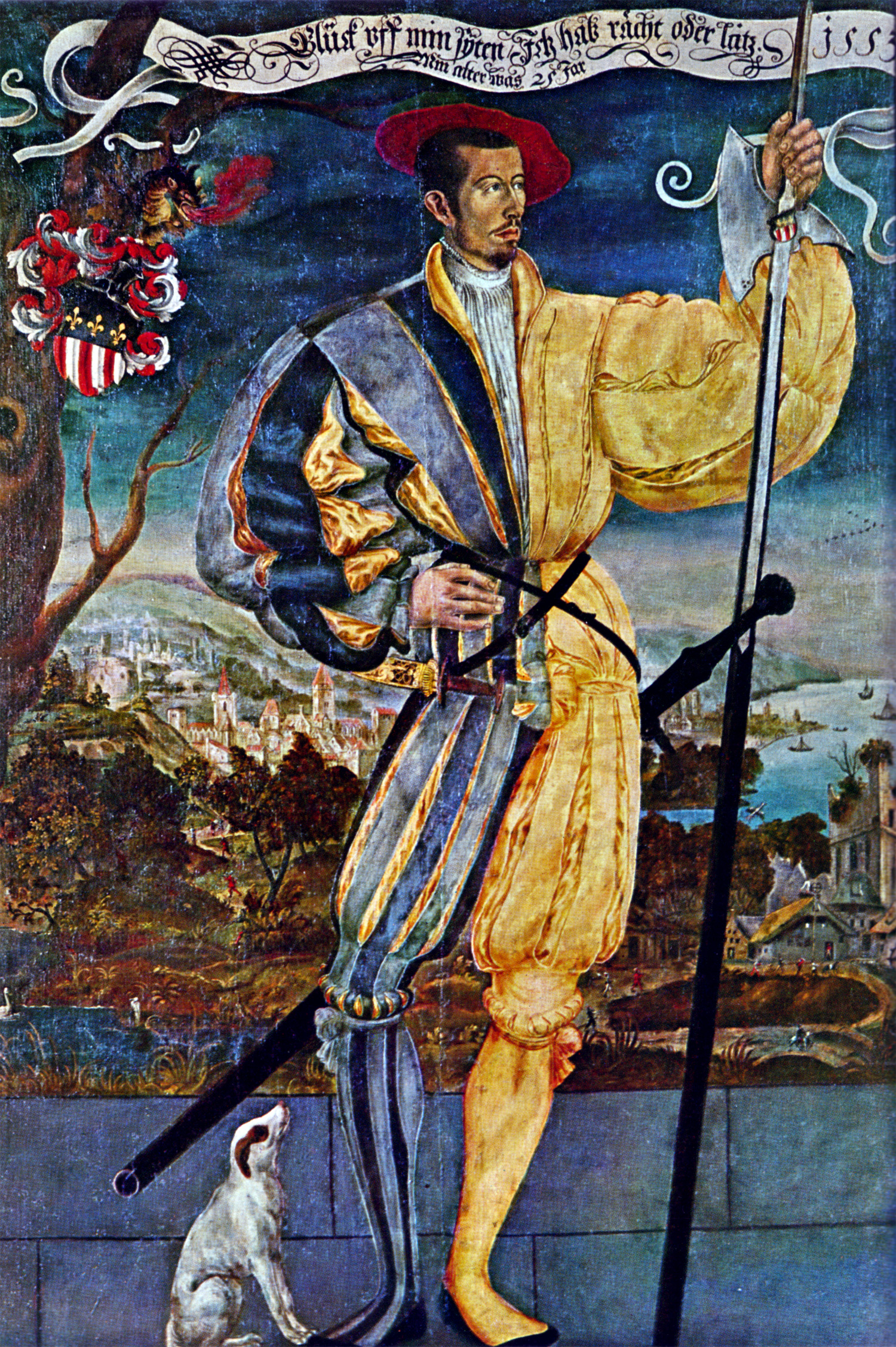 Porträt von Niklaus Manuel Deutsch dem Jüngeren, Schweizer Reisläufer und Künstler. Er ist dargestellt in der Tracht eines Reisläufers mit Hellebarde, Schweizerdolch und Anderthalbhänder.